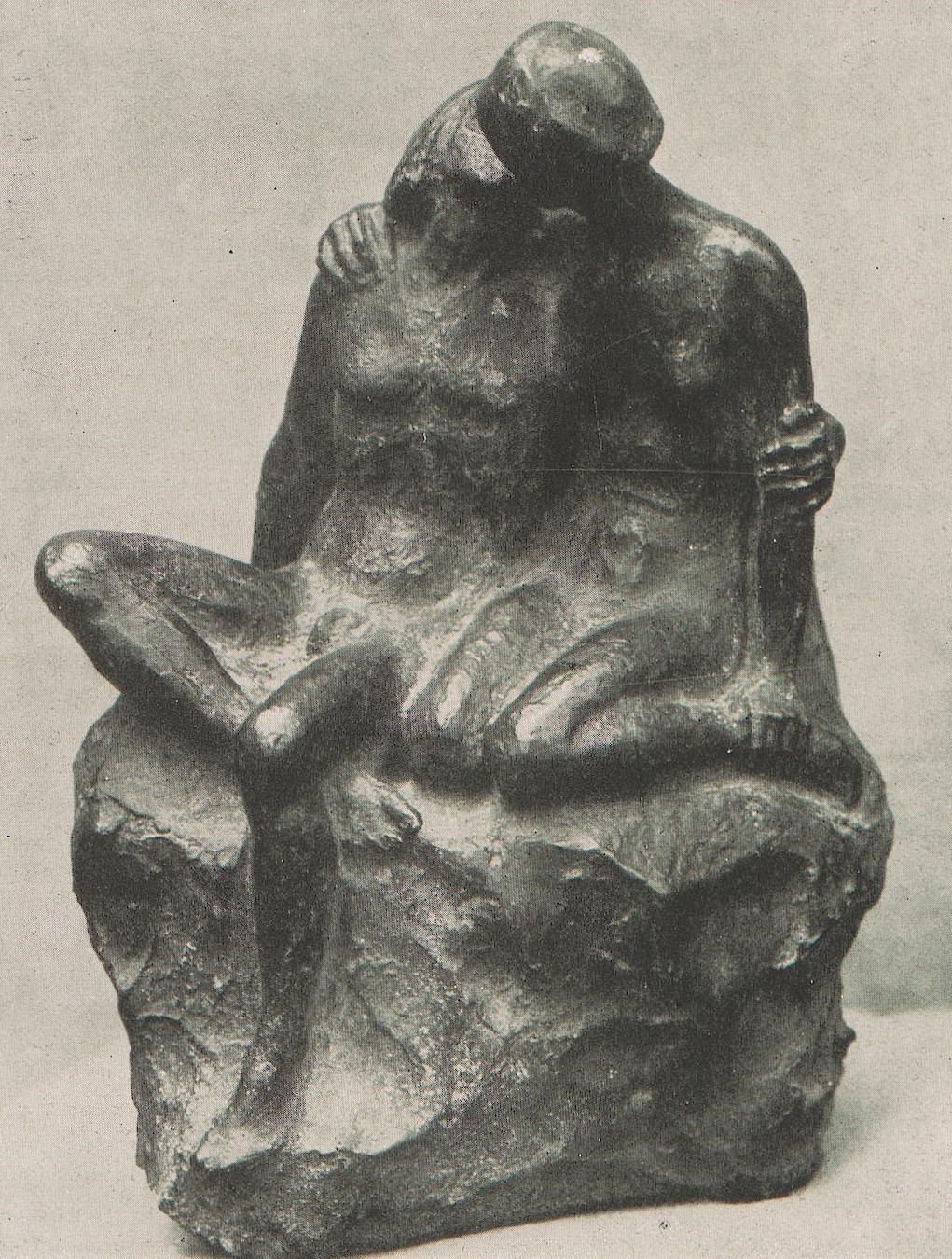 Rudolf Bosselt: Bronzegruppe Frühling